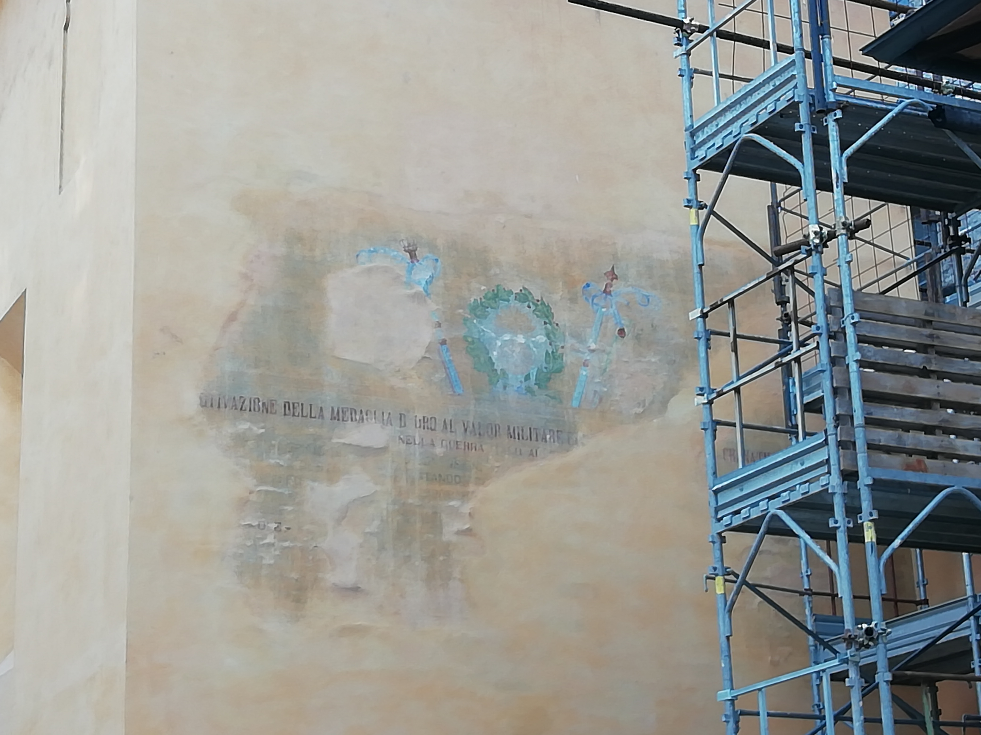 Ospedale Vecchio (Parma) - restauro 2019